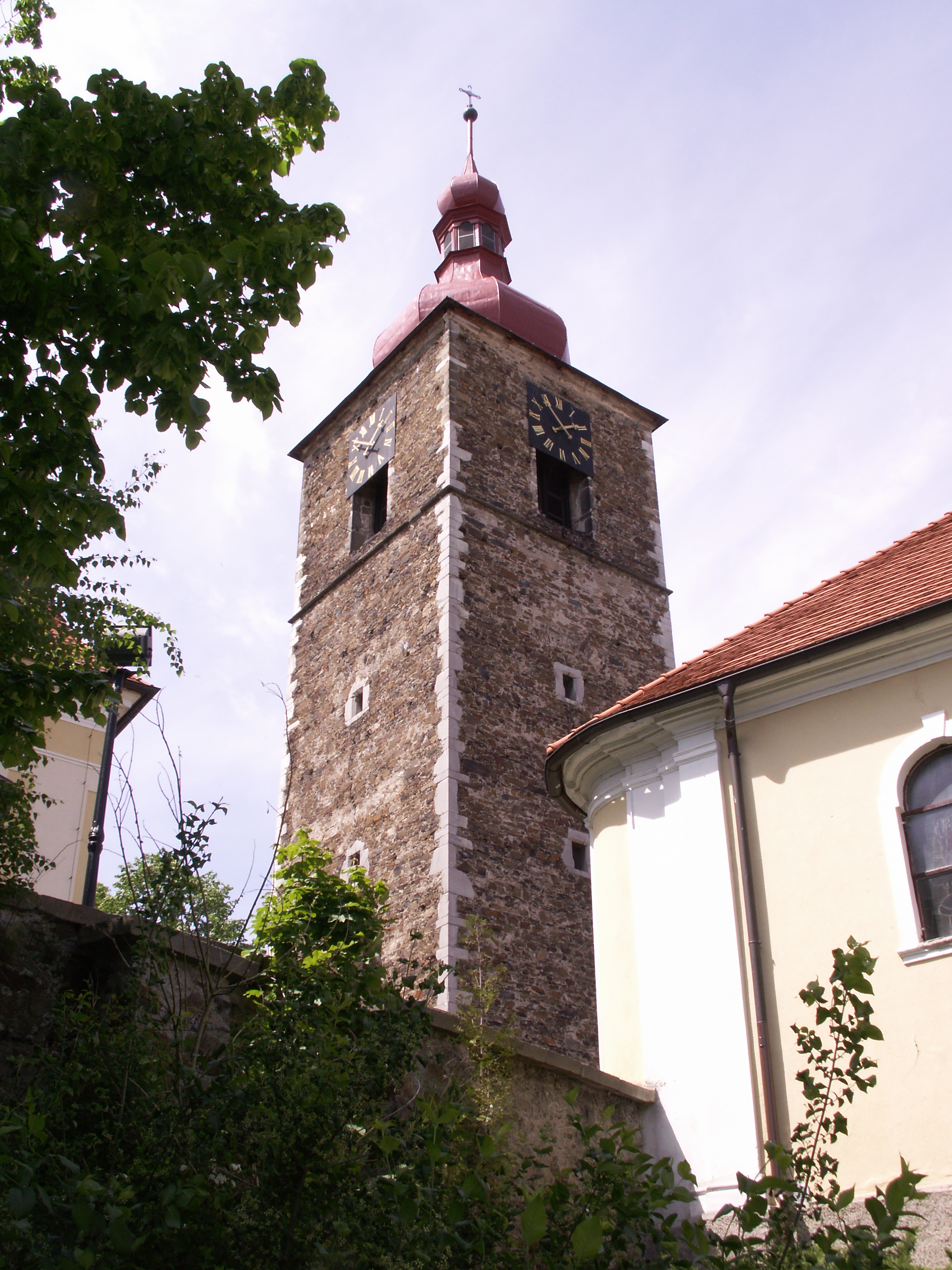 Kostel sv. Jana Křtitele s věží, Kostelní, Přibyslav